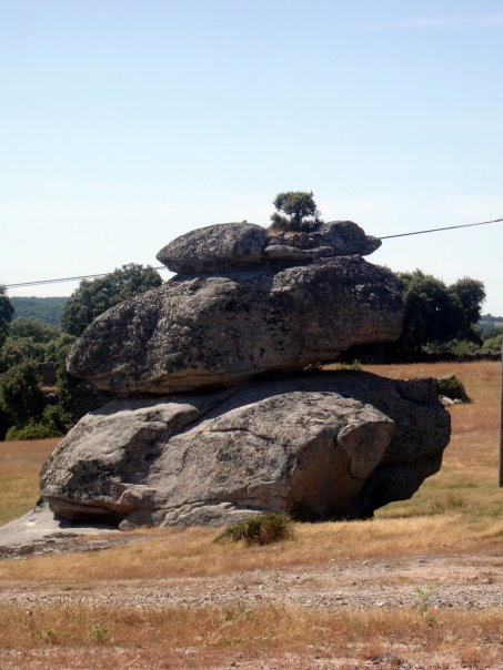 Principal símbolo del pueblo de Castro de Alcañices.